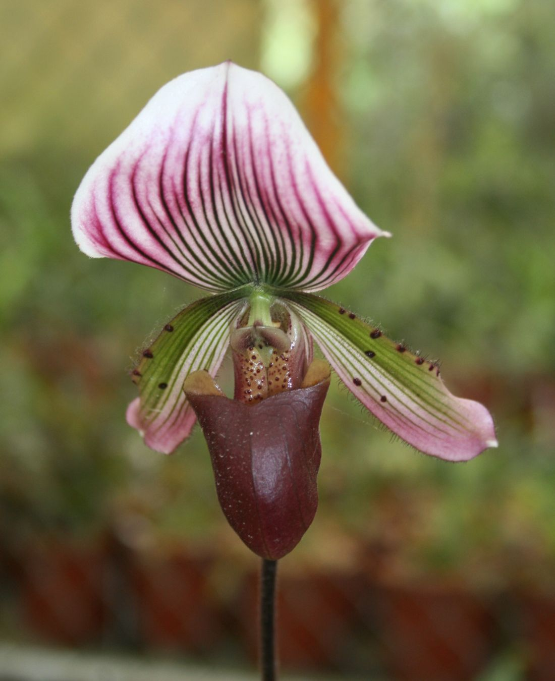 Paphiopedilum callosum, Orchideen (Orchidaceae) - Costa Rica: Prov. Cartago, Paraíso, Jardín Botánico Lankester/Lankester Botanical Garden, Orchid greenhouse